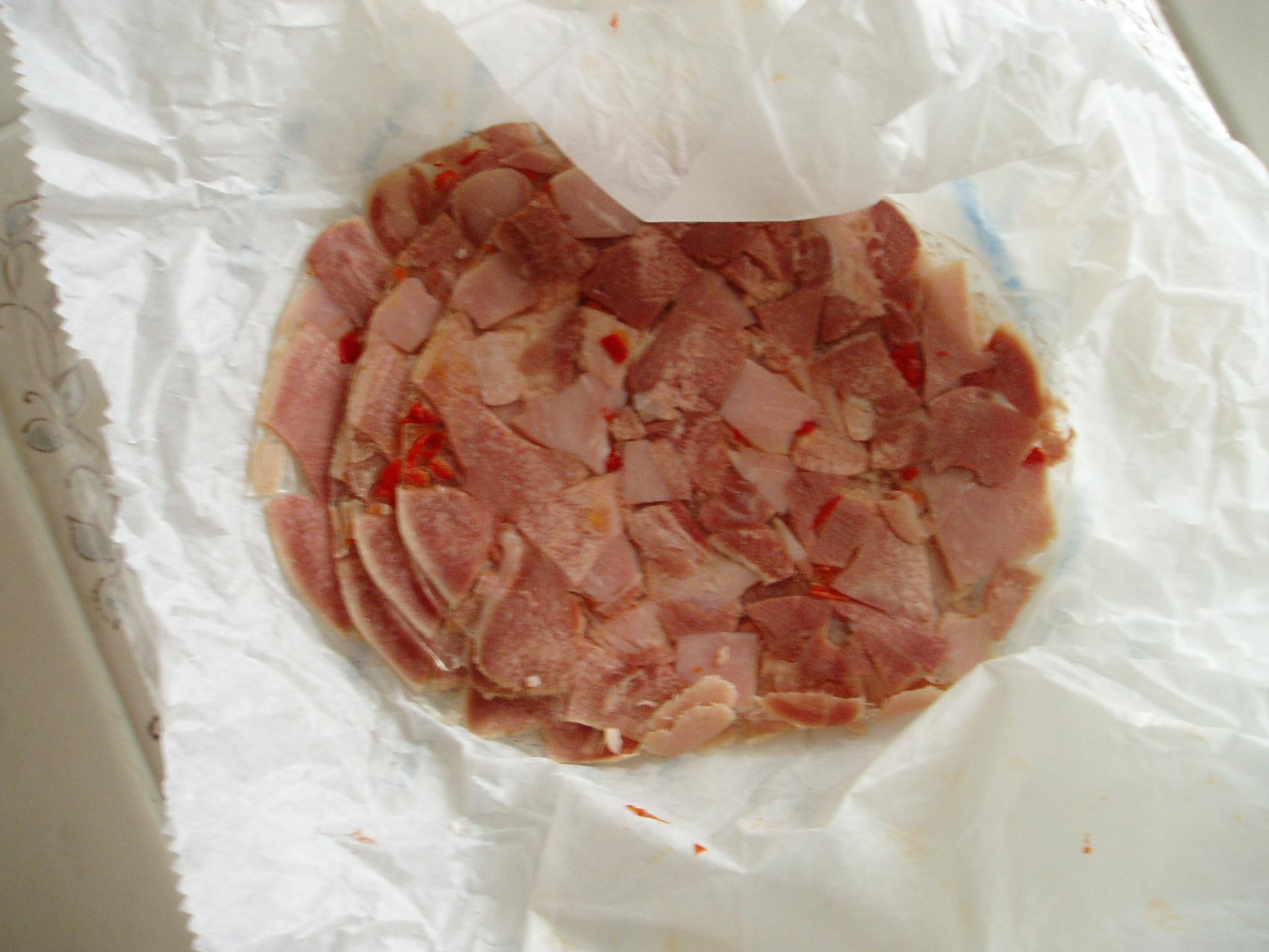 head cheese